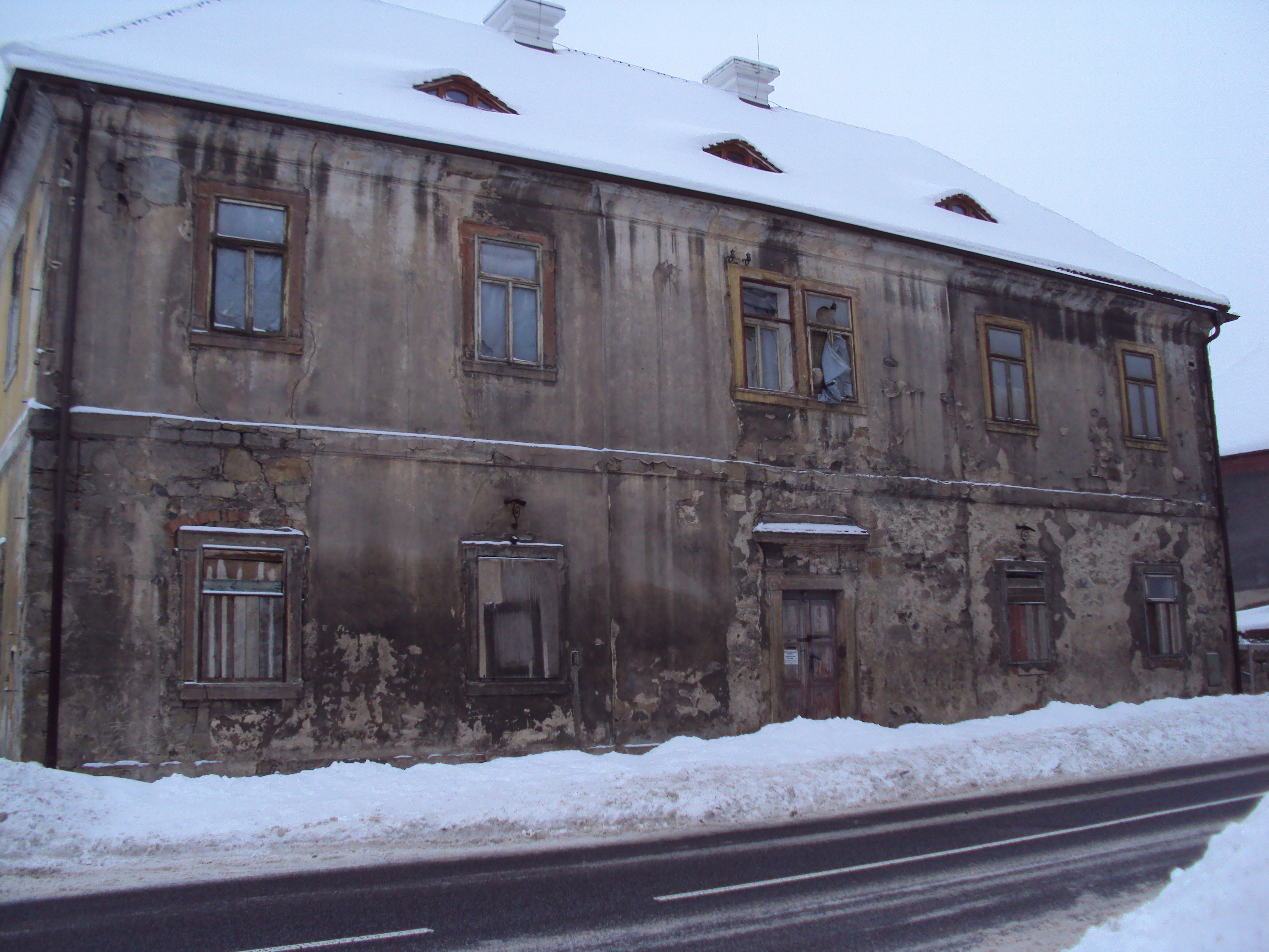 Budova fary v Jezvé